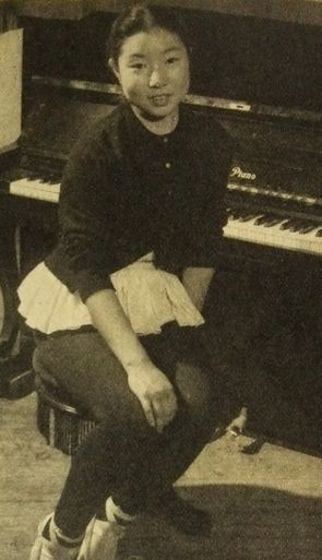 川喜多和子（フランス映画社副社長。伊丹十三の妻、川喜多長政の娘）